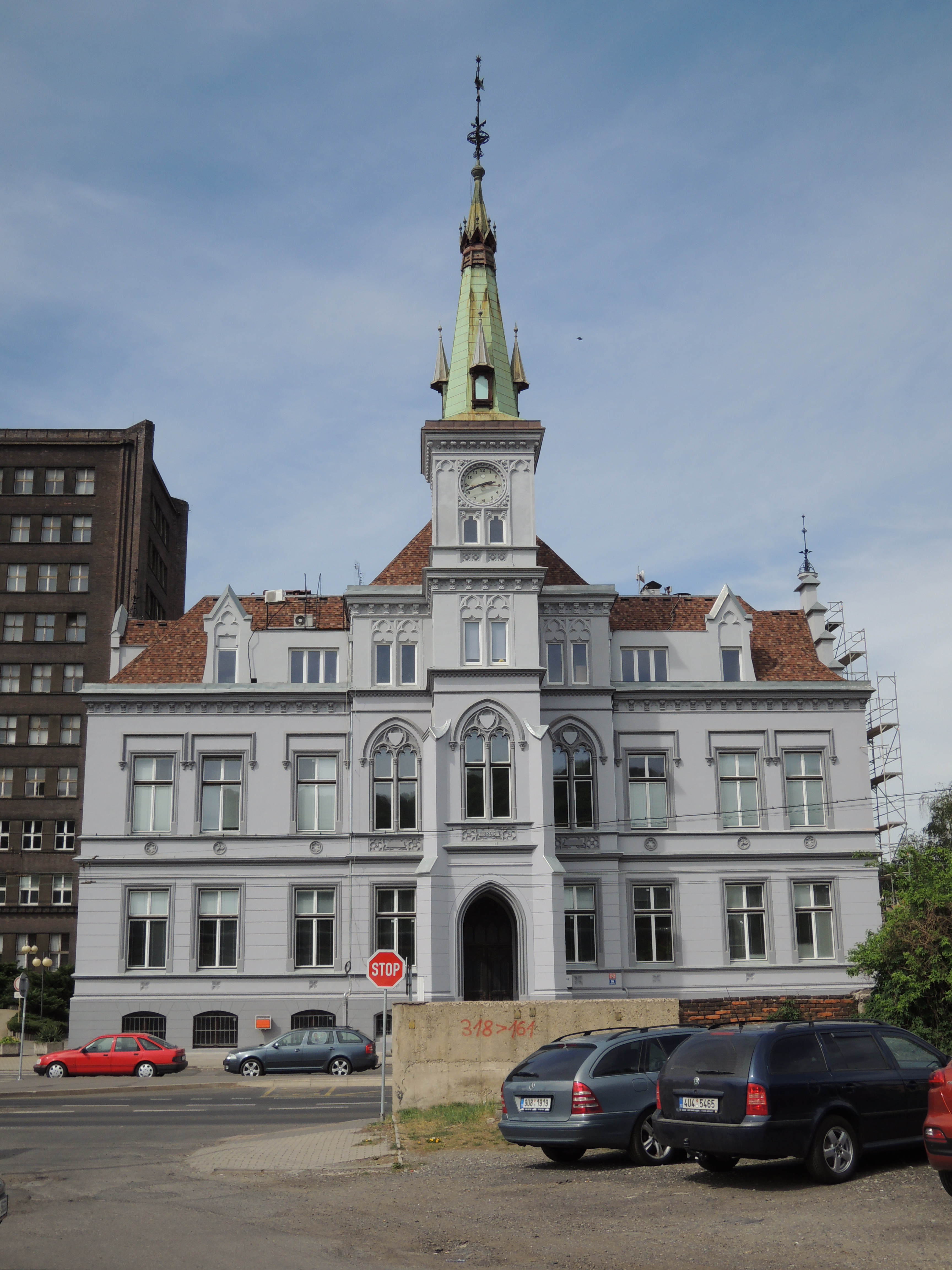 Stará správní budova Spolku pro chemickou a hutní výrobu po obnově fasády